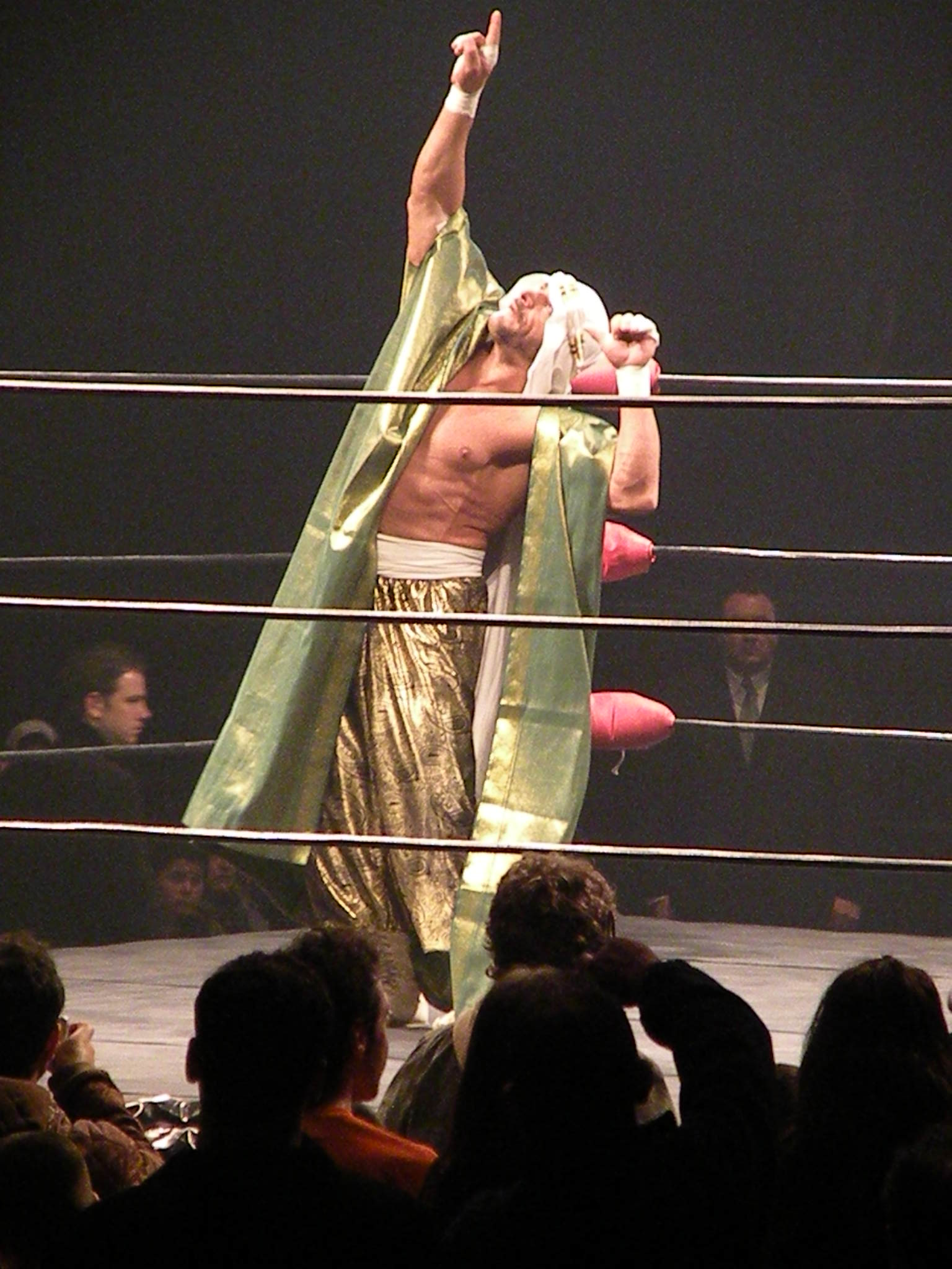 sabu a american wrestling rampage 2009 paris